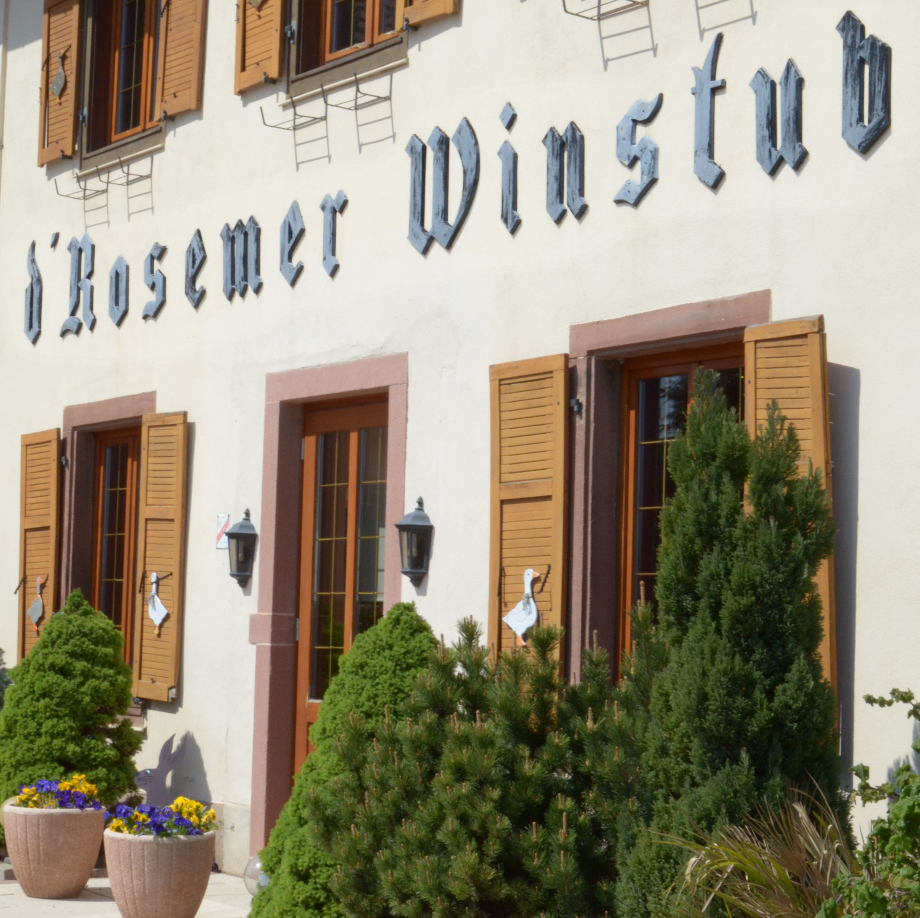 À 200 m environ du ruisseau Rosenmeer, à la lisière de Rosheim, le "restaurant bar à vins" annexe du restaurant étoilé Michelin des Maetz porte un nom dialectal prêté au très mince cours d'eau parfois presque à sec.